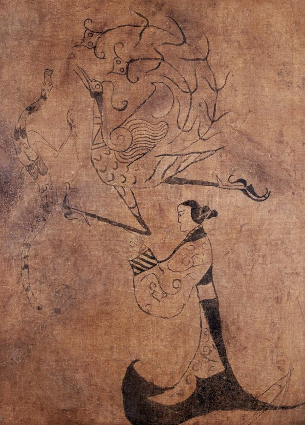 湖南省博物馆所藏人物龙凤帛画